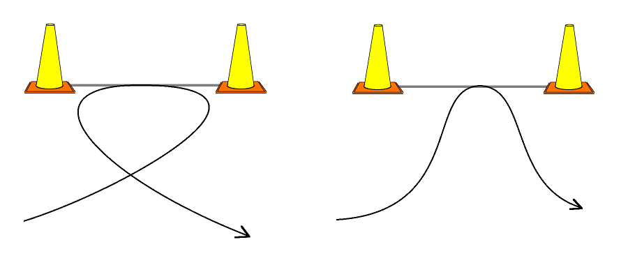 Jedna z figur które mogą wystąpić na torze w zawodach motocyklowych Gymkhana.